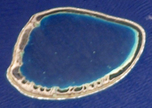 Ahunui Atoll, Archipel des Tuamotu